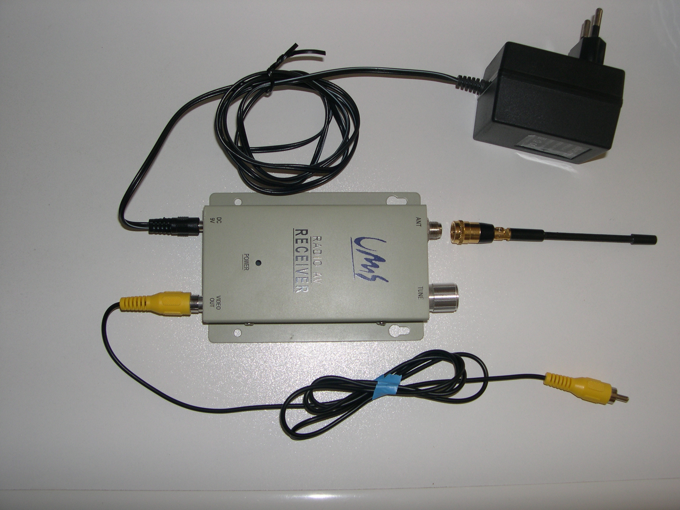 Récepteur vidéo FM universel réglable, dans une quelconque fréquence au choix allant de 860 à 1300 MHz. Pour caméra sans fil émettant dans la partie spectrale ISM ou alors bande radioamateur. On remarque l'entrée sur connecteur F pour, ici, antenne tige (ou fouet) omnidirectionnelle, 0 dBd, ou pour antenne extérieure directive pouvant être dotée d'un préamplificateur d'antenne